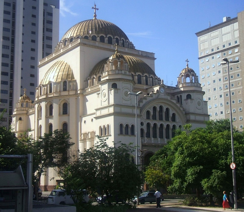 Catedral Metropolitana Ortodoxa de São Paulo, no bairro do Paraíso.